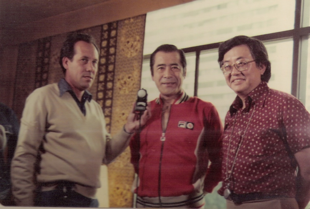 Mamoru Miyao dirigindo Toshiro Mifune no comercial da Varig